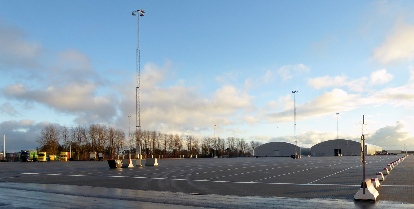 En ny parkeringsplats för långtradare i Ystads hamn 2018.